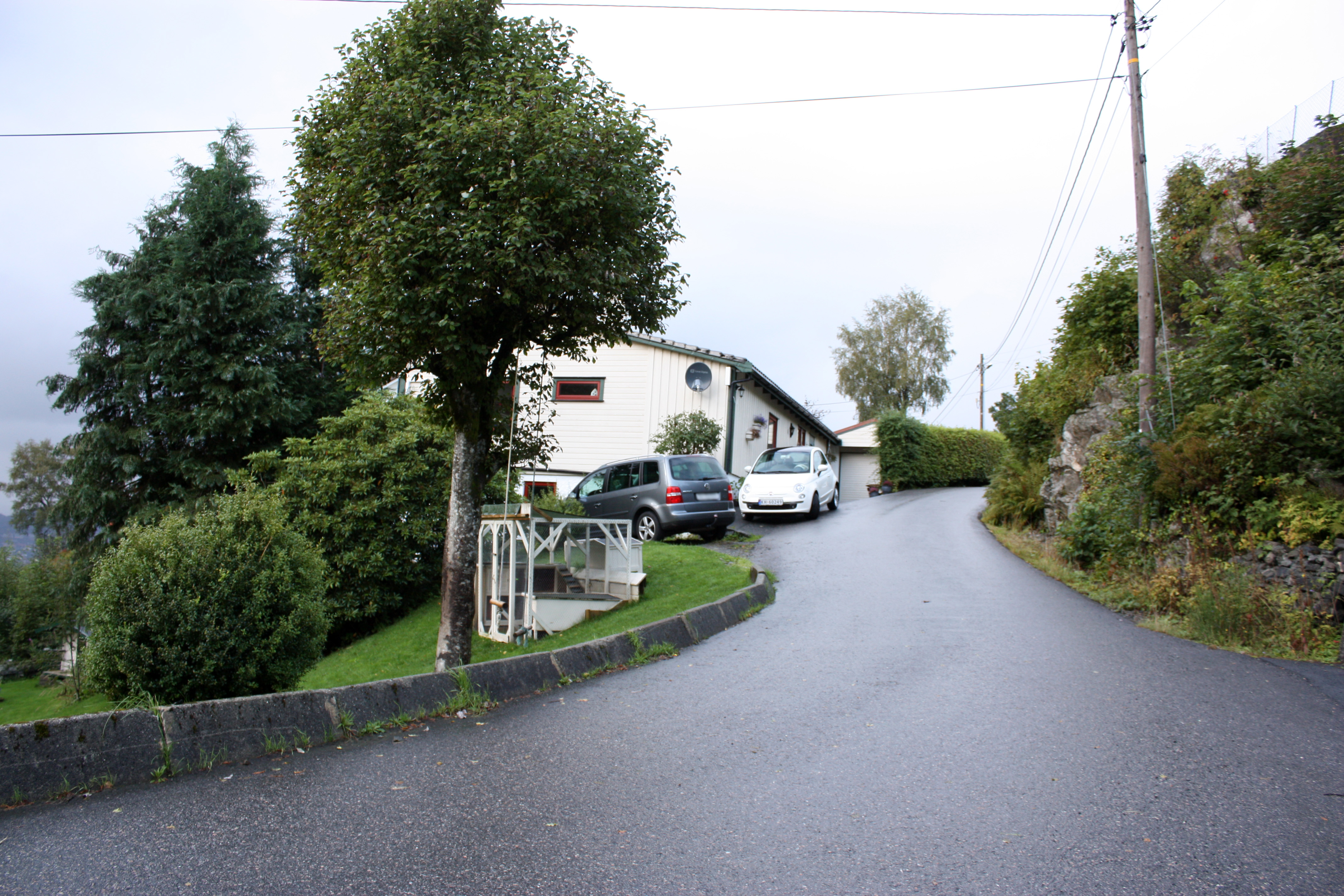 Ekerstølsvegen, Fana, Bergen.